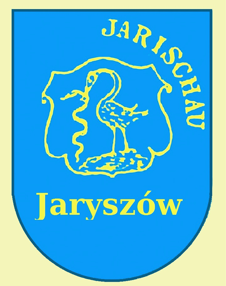 Na podstawie pieczątki Gemeinde Jarischau.